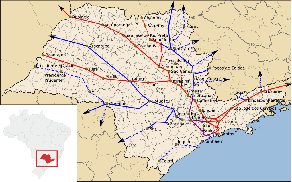 Mapa de Ferrovias do Estado de São Paulo